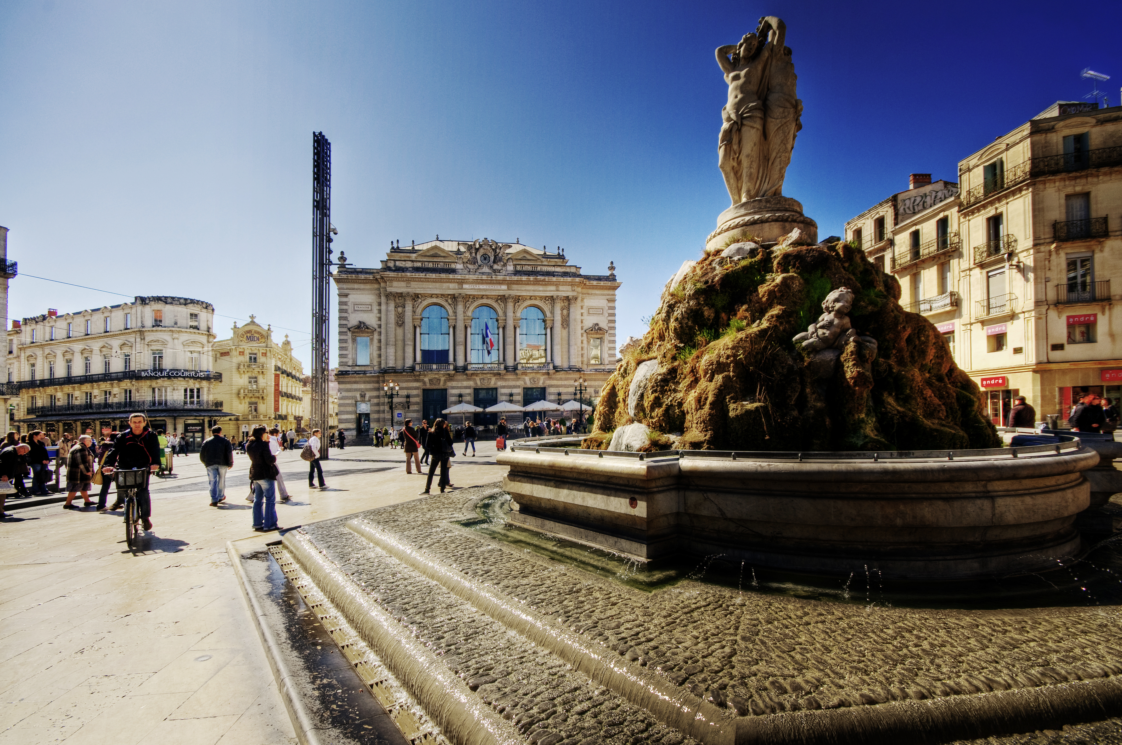 Montpellier Place de la Comédie